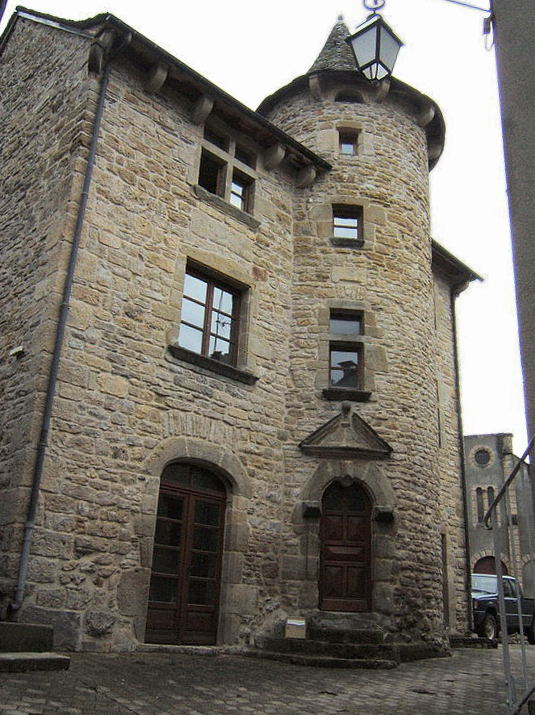 mairie de Bleymard